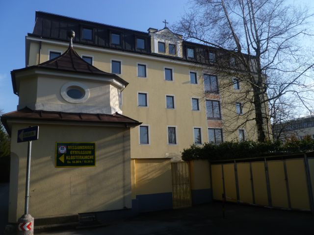 Schloss_Schönleiten-Rückseite_des_ehemaligen_Schlosses